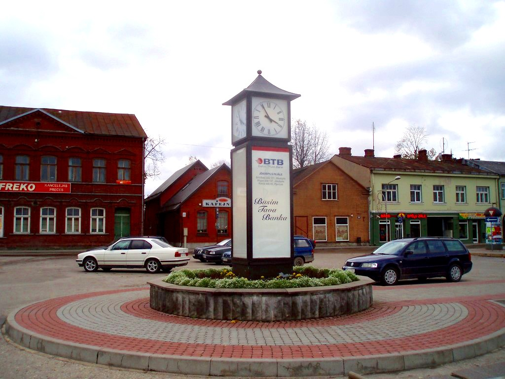 Jēkabpils Vecpilsētas laukuma pulkstenis 2007. gada 13. oktobrī.